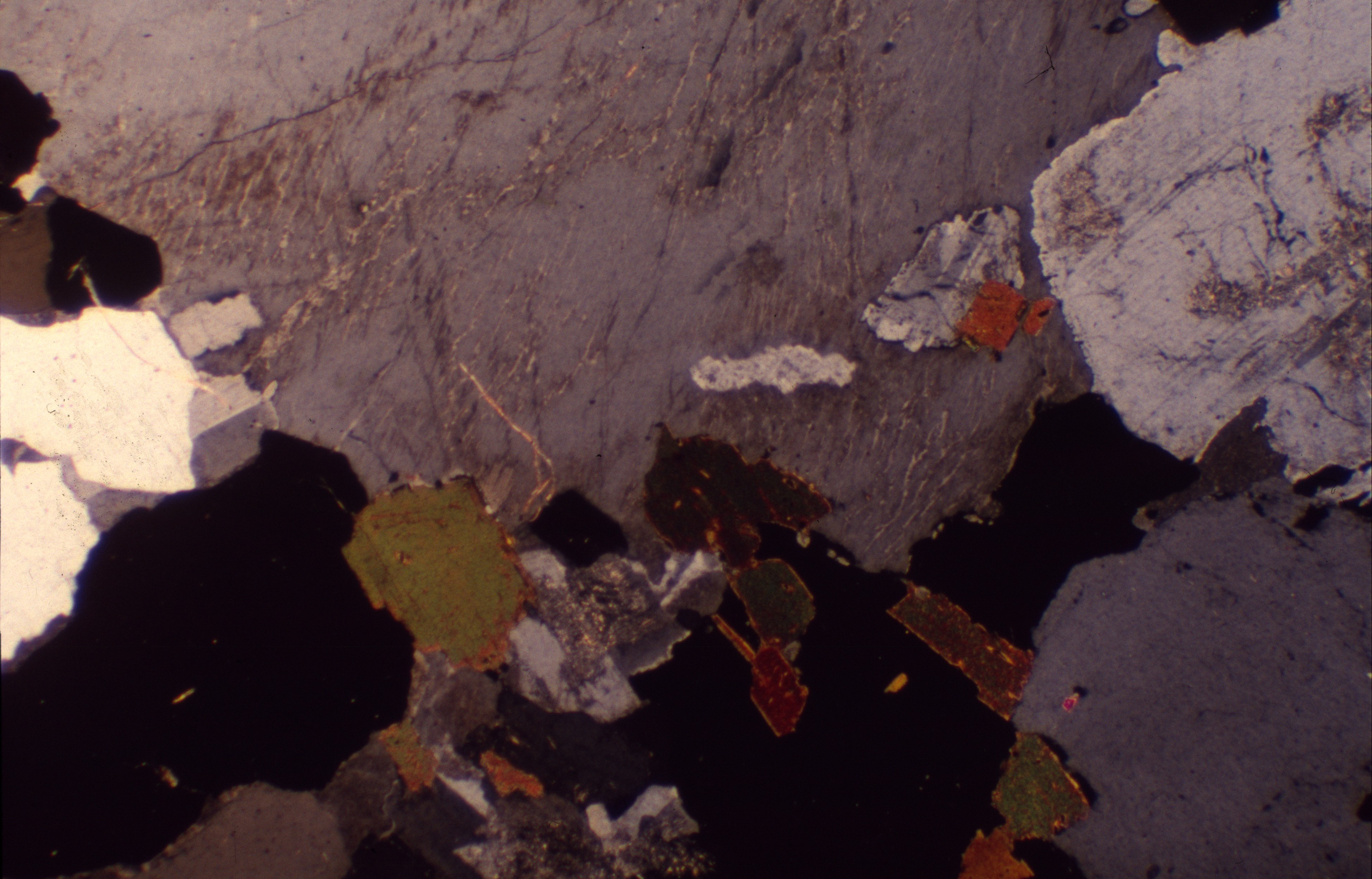 Microphotographie d'une lame mince de granite porphyroïde LPA x100 Une grosse quantité de minéraux blancs à faible relief sont visibles, Quartz (limpide, teinte de polarisation de blanc à noir roulante) et feldspaths alcalin (altéré, teinte de polarisation grise), quelques plagioclases (altérés, teinte de polarisation grise et macle polysynthétique). Quelques minéraux noirs sont visibles, principalement un mica noir, la biotite (teinte de polarisation orangé). La structure dite porphyroïde découle des cristaux de feldspaths alcalins très gros, 10 fois plus que le quartz, les plagioclases et la biotite.